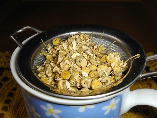 ajout de comptenu